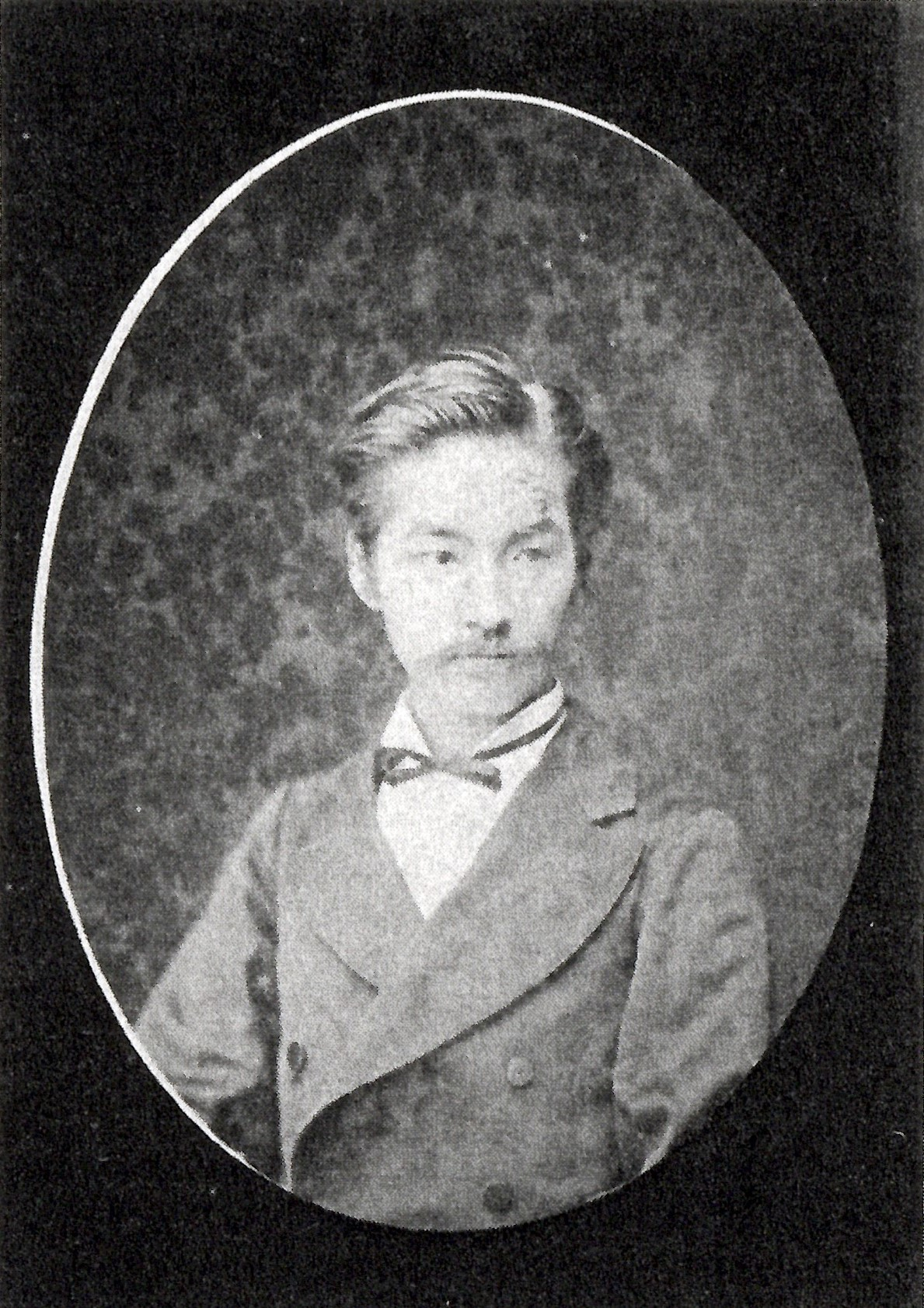 高木正善の肖像写真。